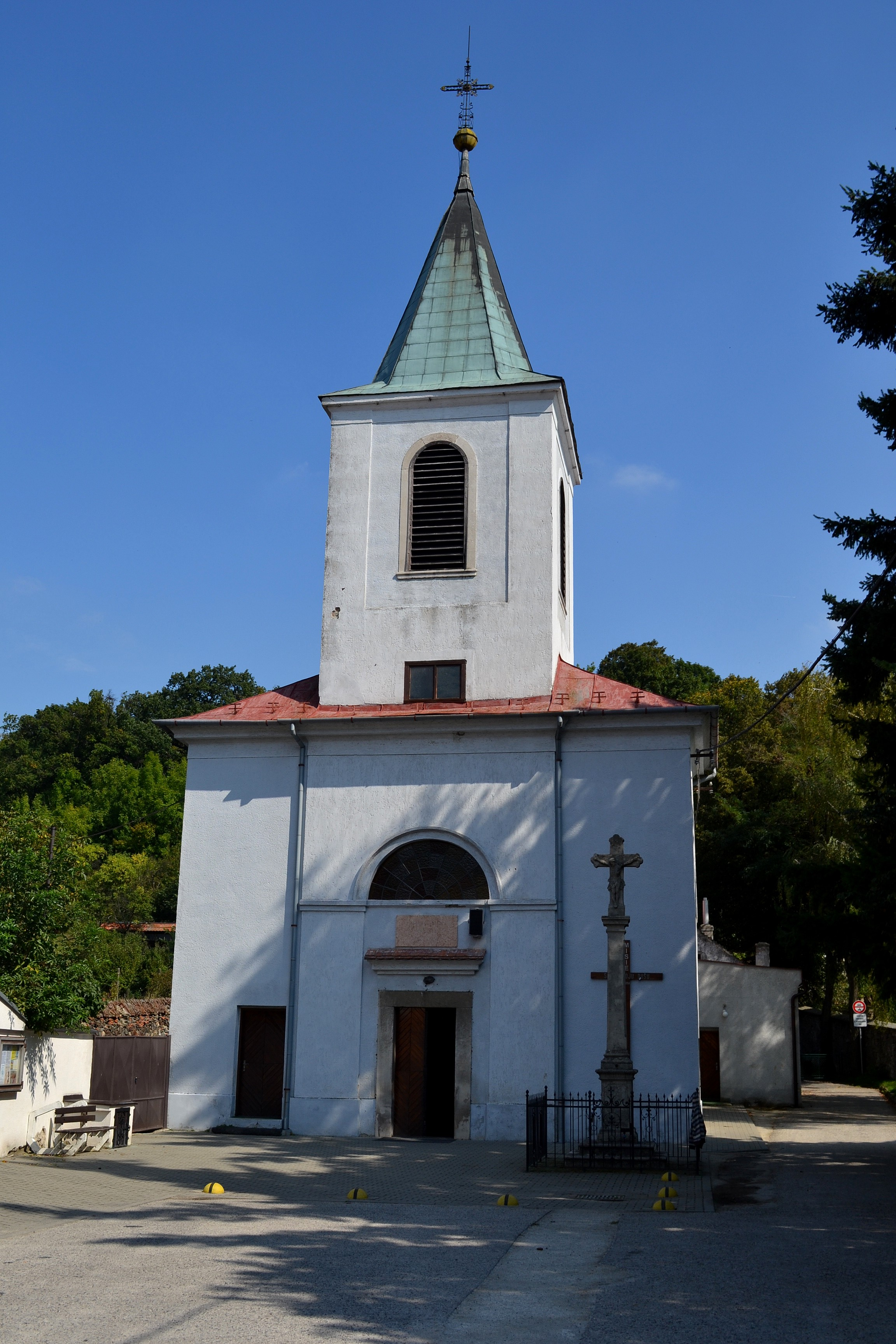 Kostol svätej Kataríny Alexandrijskej v Doľanoch (okr. Pezinok)